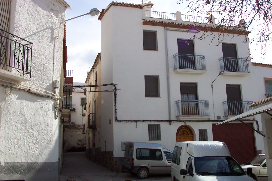 Detalle de la Placilla y de la calle Mesón Detalle de diferentes calle de Alcolea de Almería Fotografía realizada por José Manuel Escudero, febrero de 2003.